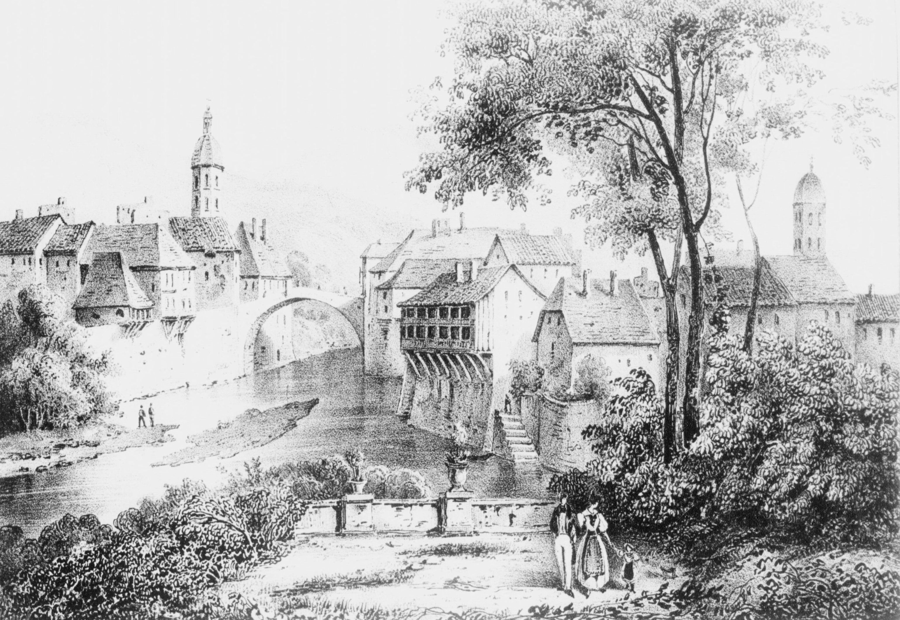 Pont de Beauvoisin (Isère). Album du Dauphiné, ou Recueil de dessins représentant les sites les plus pittoresques du Dauphiné.